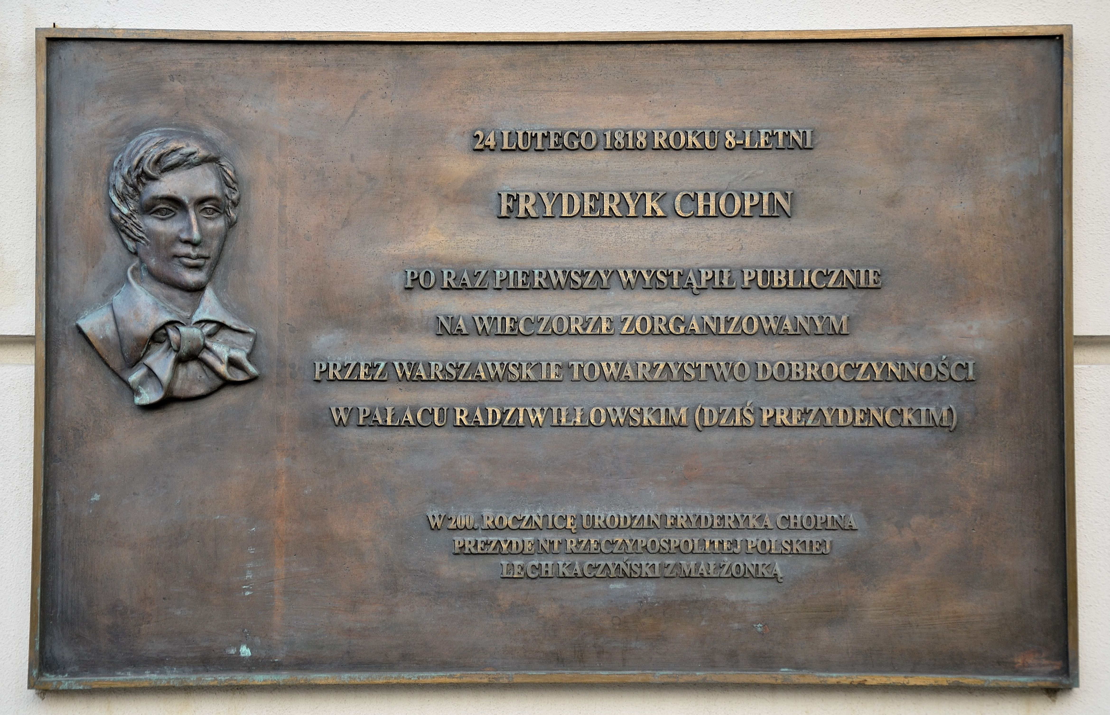 Tablica upamiętniająca pierwszy publiczny koncert Fryderyka Chopina na fasadzie Pałacu Prezydenckiego w Warszawie